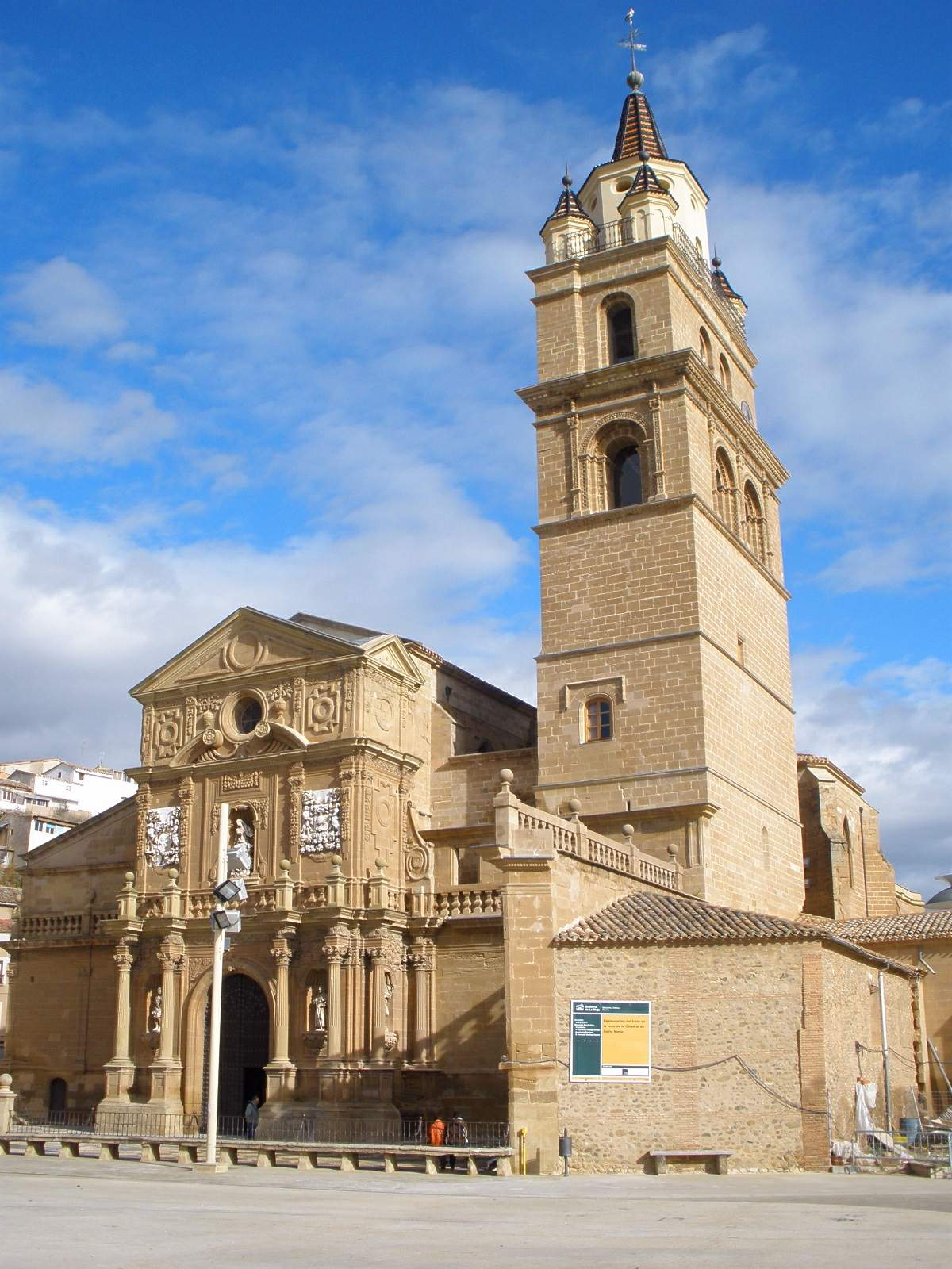 Catedral de Calahorra (La Rioja)